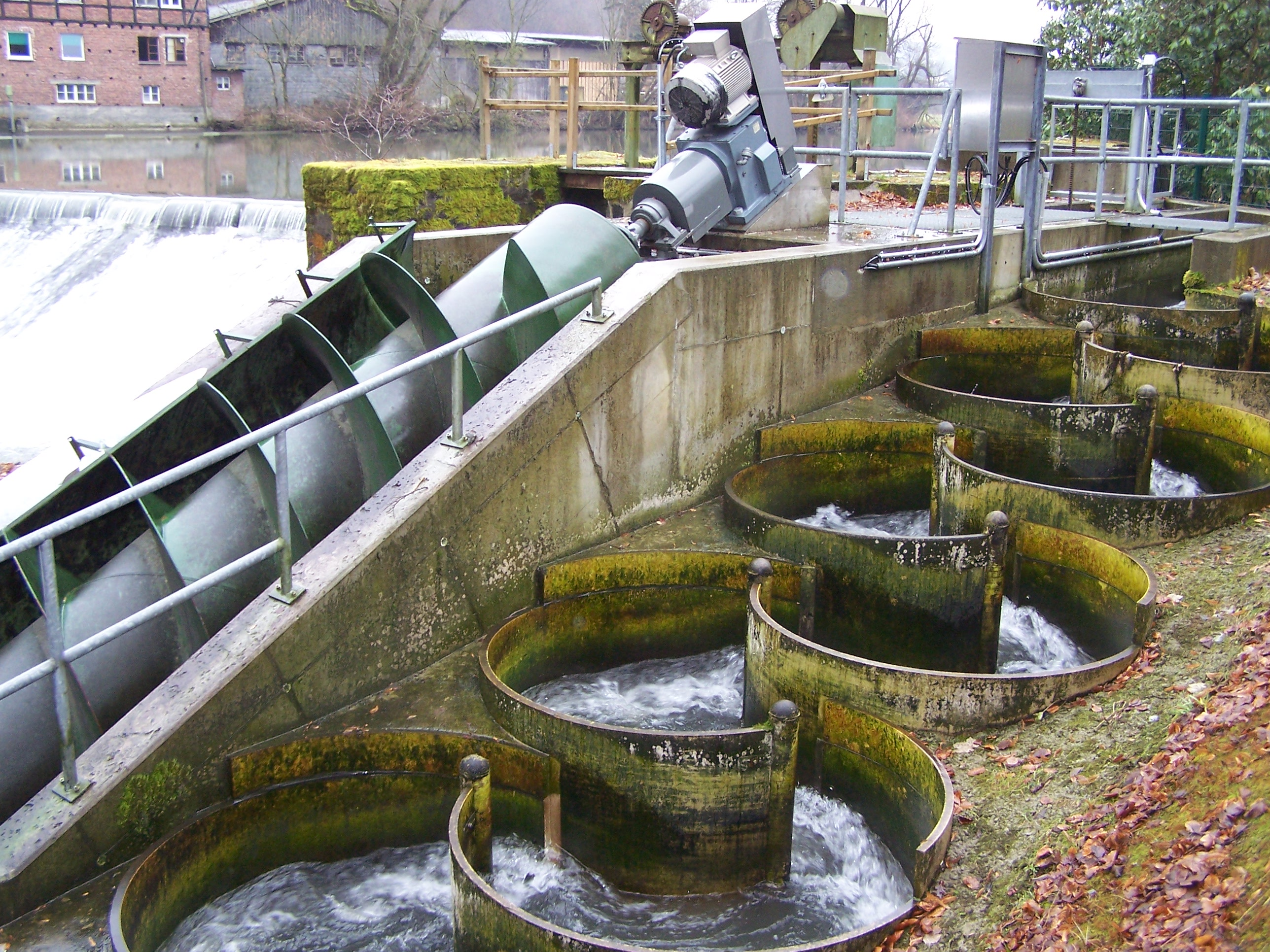 Mäandrierende Fischtreppe am Stauwehr der Ruhr beim Wasserschloss Laer (Meschede) – Der Mäander-Fischpass Typ 1819 C 1,2 wurde im Jahr 2005 gebaut und hat 13 Becken bei einer Fallhöhe von 2,5 m.